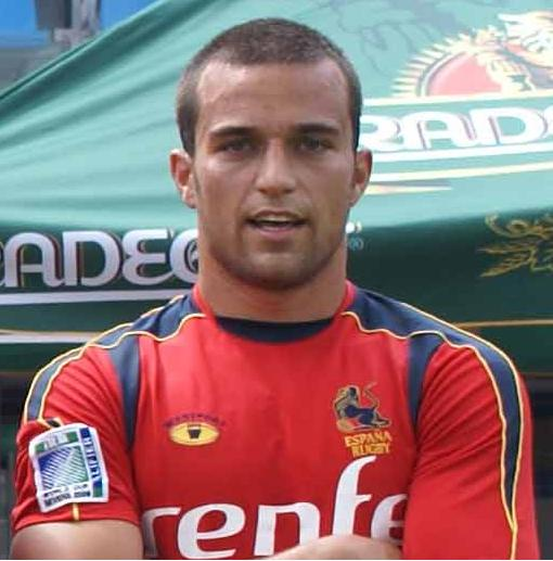 Cesar Sempere durante el campeonato de rugby seven de Corfú